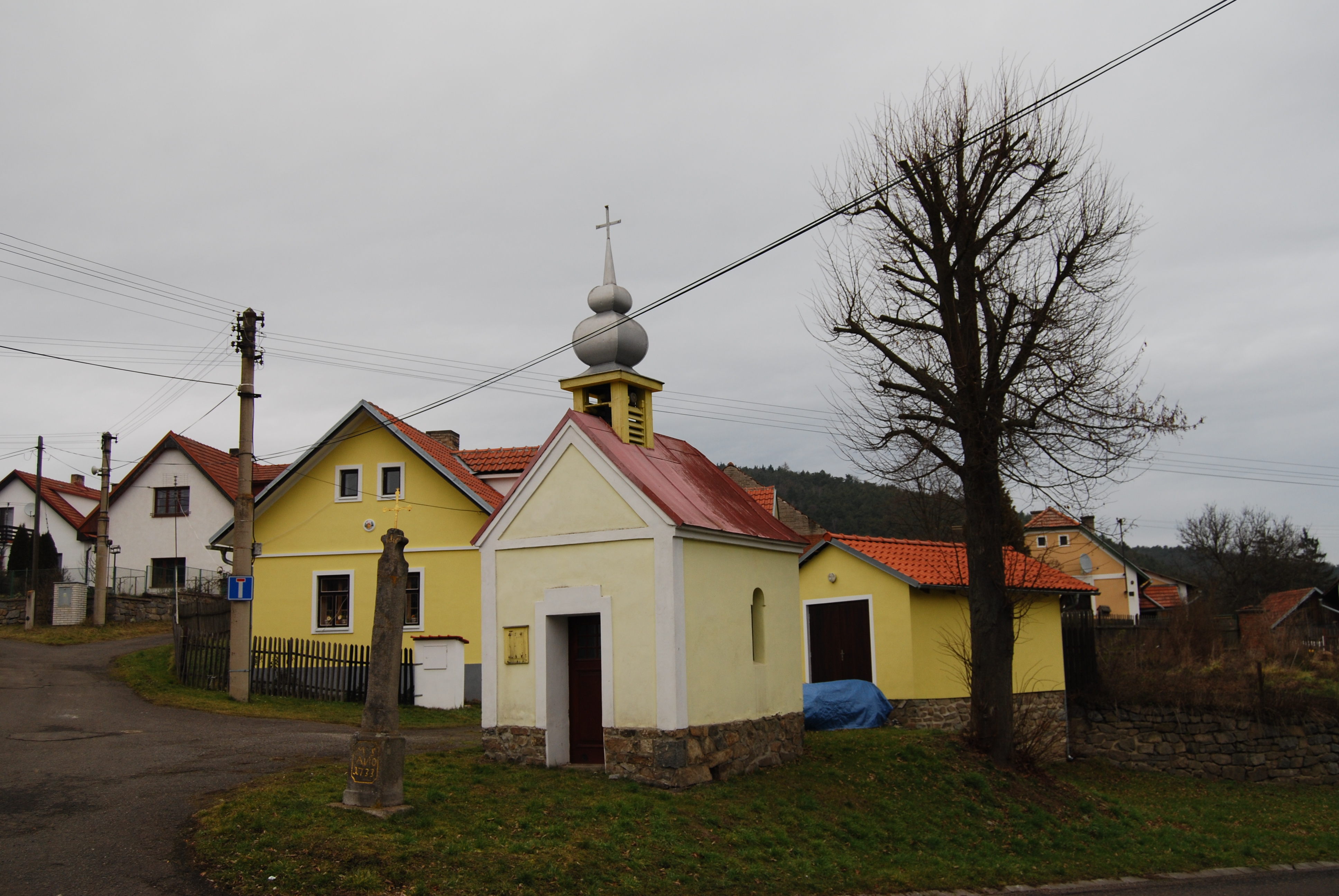 Návesní kaple a kříž. Bohostice v okrese Příbram, kraj Středočeský. Česká republika. - OpenStreetMap (Info)